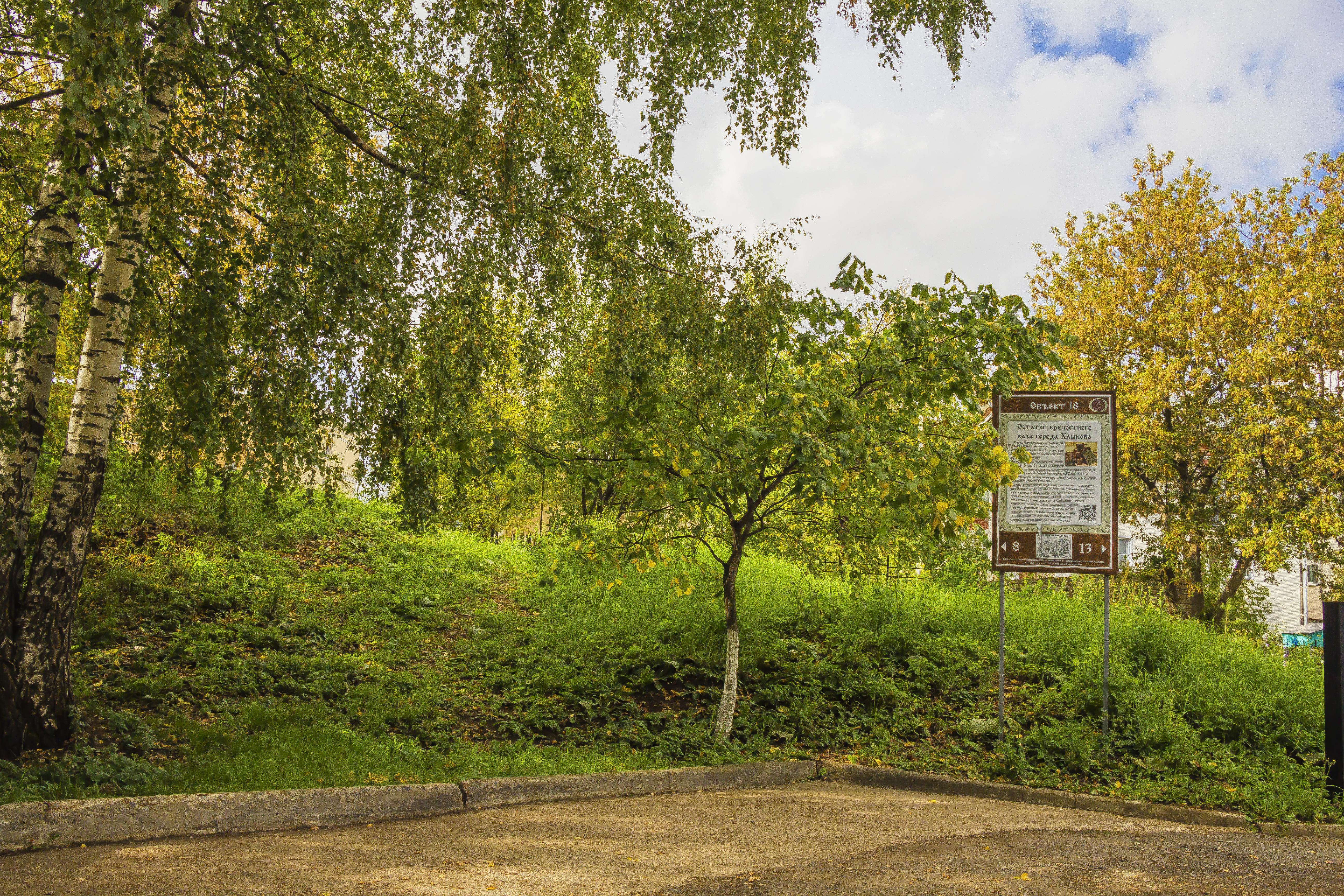 Остатки земляного вала города Хлынова: улицы Володарского, Герцена, Спасская, Карла Маркса, Коммуны, Свободы, Степана Халтурина, Энгельса, Киров, Кировская область